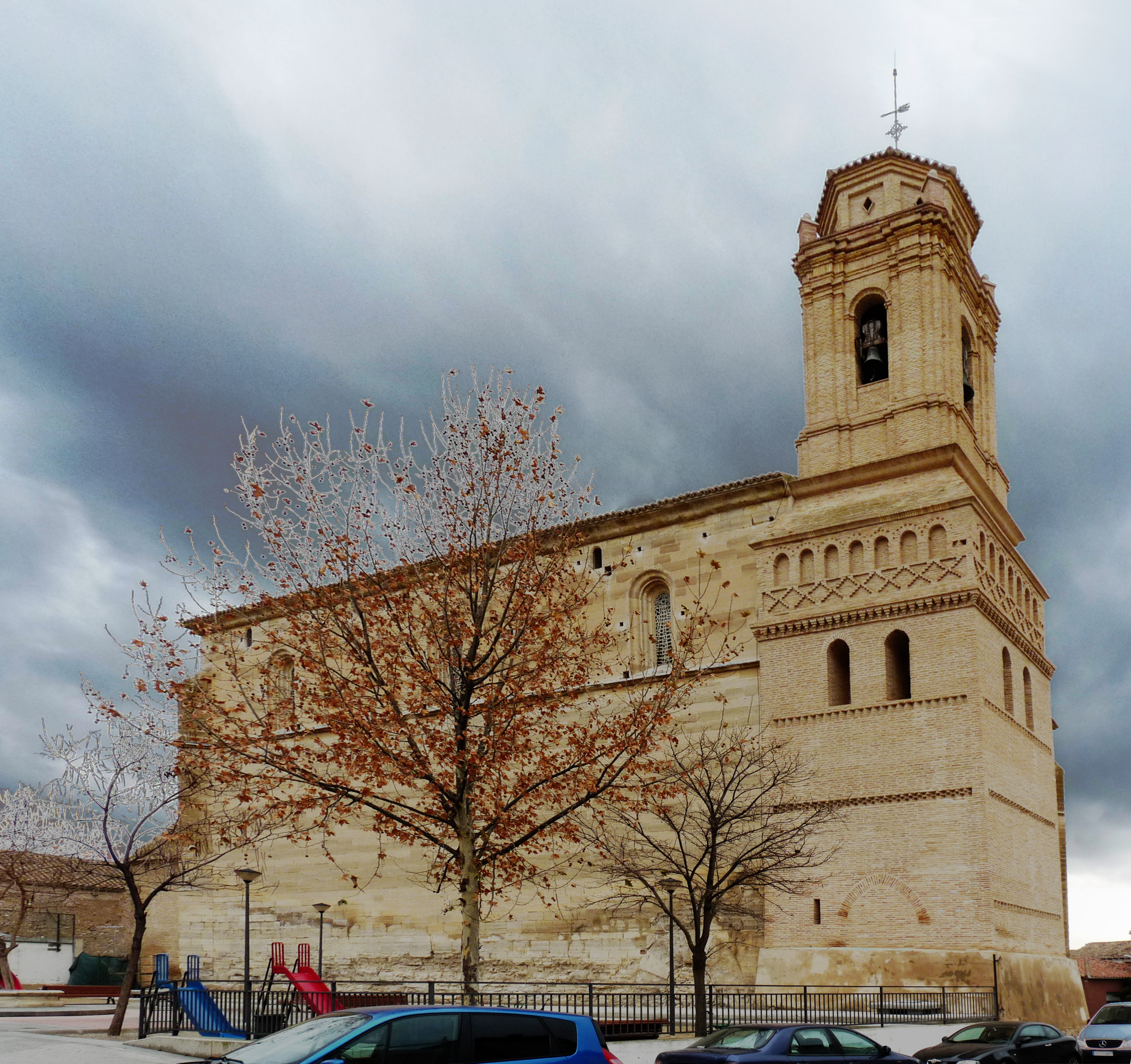 Leciñena - Iglesia de Nuestra Señora de la Asunción - Mudéjar aragonés de la segunda mitad del siglo XVI